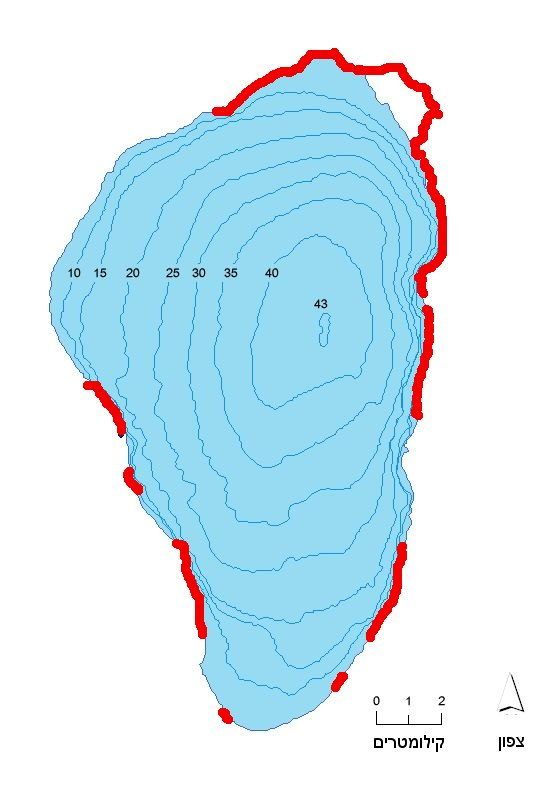 שביל סובב כנרת - עדכון תחילת 2010